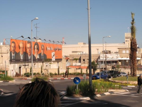 שלט חוצות של מפלגת בל"ד. מבט מואדי ניסנאס